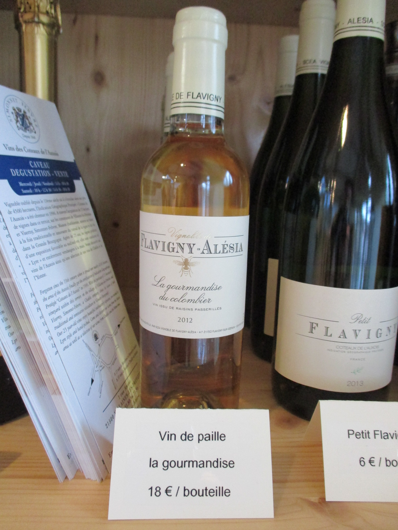 Vin de paille anecdotique de Flavigny Alesia, en Bourgogne